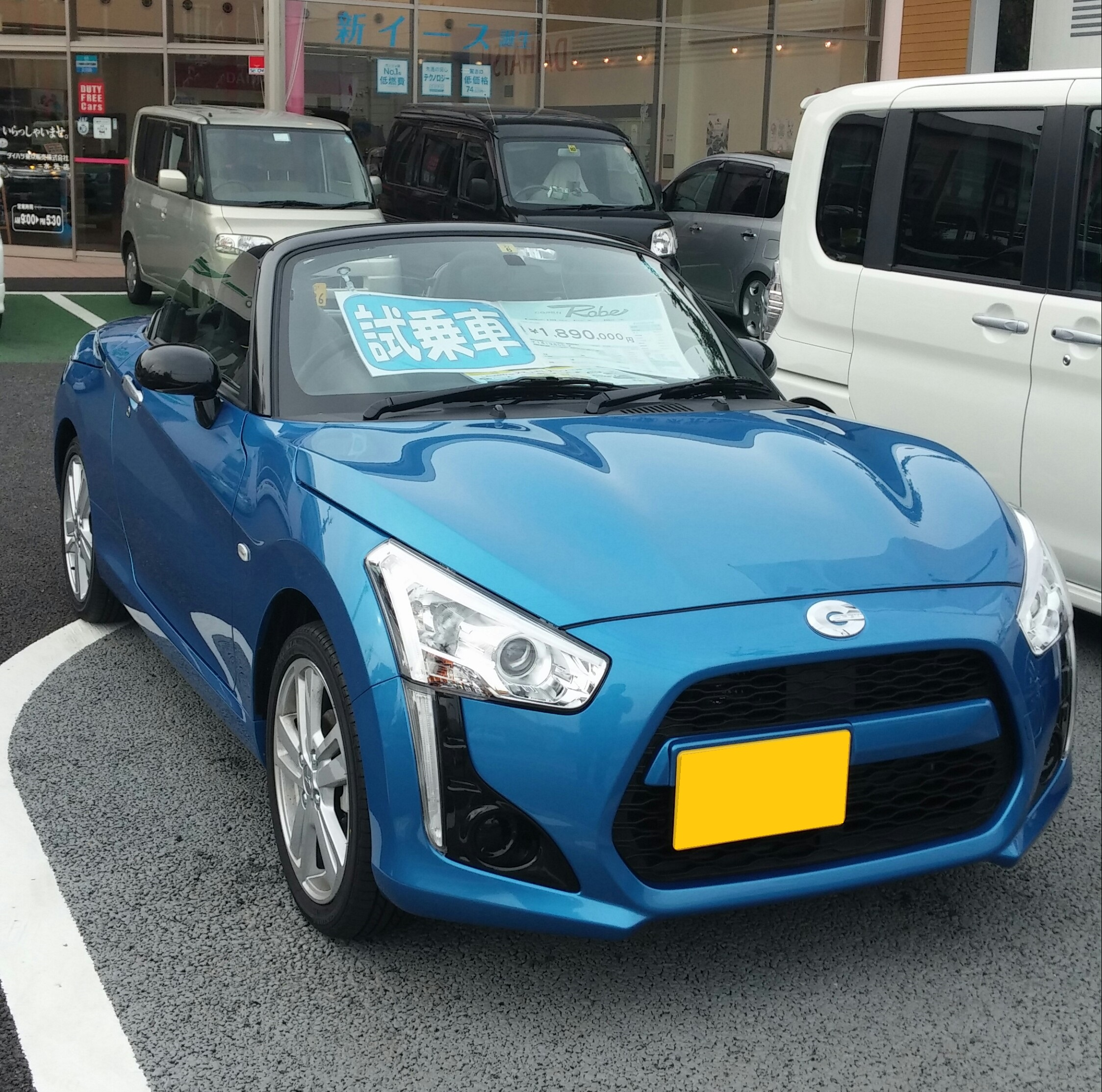 ダイハツ・コペン